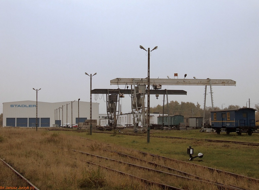 Siedlce Wschodnie